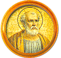 Médaillon de la frise des papes à Saint-Paul-hors-les-Murs. Il s'agit d'une mosaïque représentant Zosime, 41e pape de l'Église catholique (18 mars 417-26 décembre 418). Il fait partie de la série de médaillons voulue par Grégoire XVI destinée à remplacer ceux de l'ancienne basilique après l'incendie de 1823.